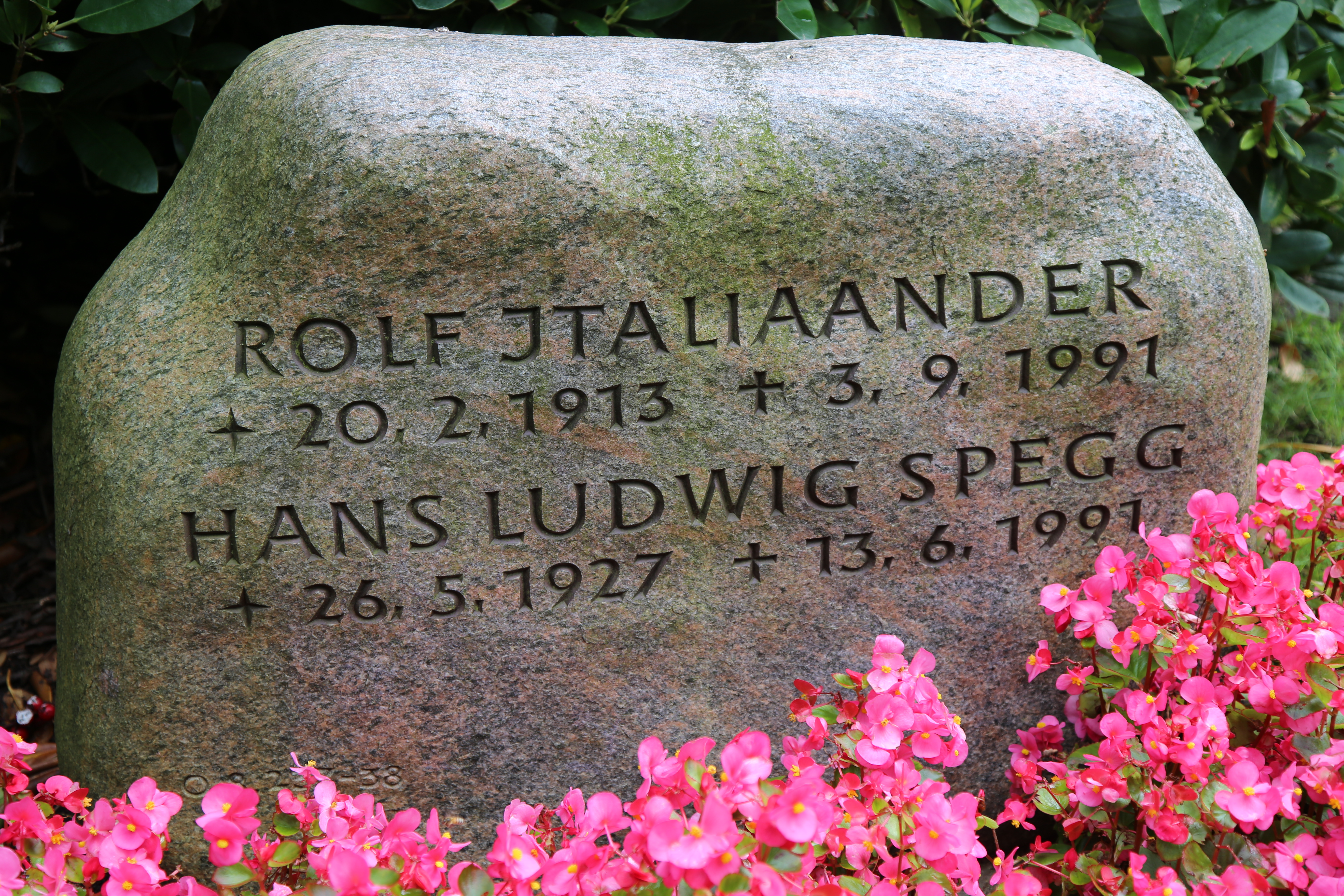 Rolf Italiaander (* 20. Februar 1913 in Leipzig; † 3. September 1991 in Hamburg) war ein deutscher Schriftsteller, Übersetzer, Kunstsammler, Forschungsreisender, Ethnograf sowie Autor von Kinder- und Jugendbüchern.